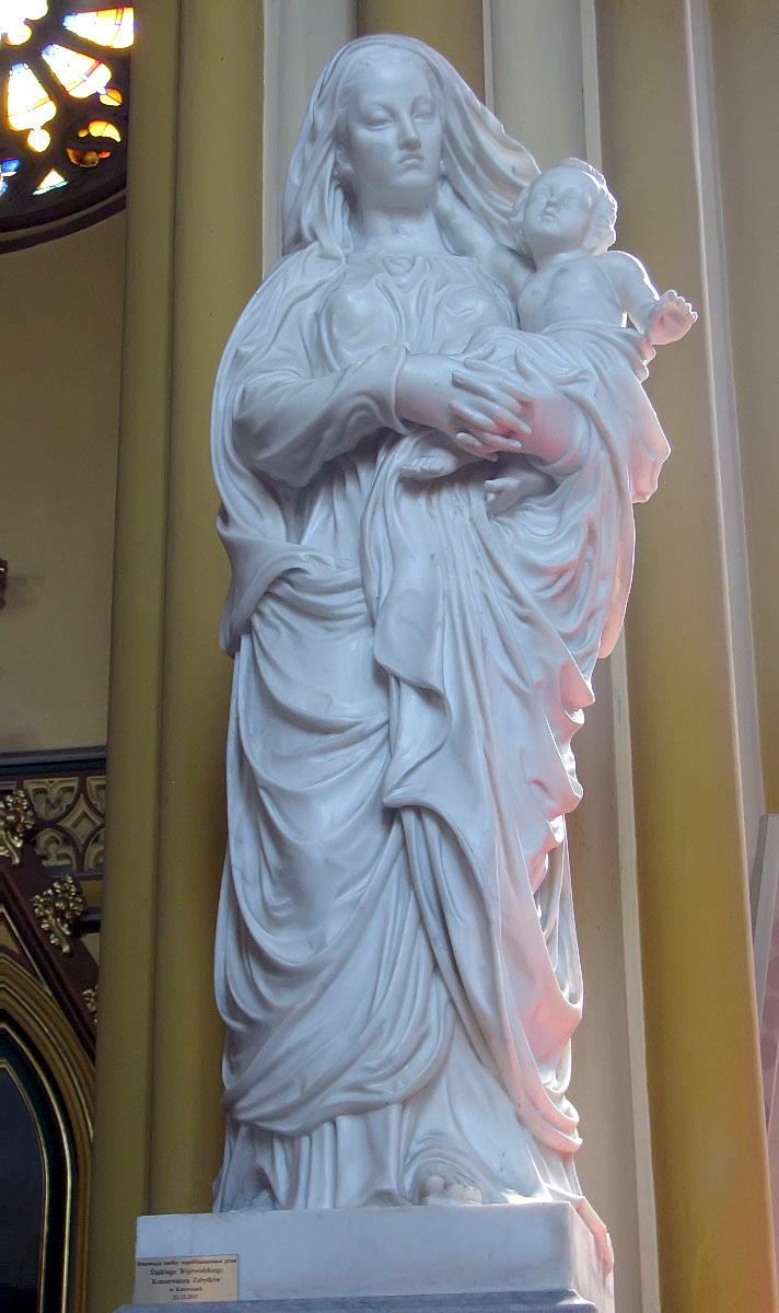 Bytom Miechowice - Rzeźba Madonny w kościele św. Krzyża autorstwa Theodora Erdmanna Kalidego urodzonego w Królewskiej Hucie (Königshütte) obecnie Chorzów